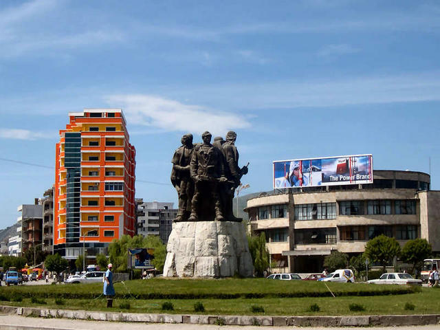 Monumenti i "5 Heronjve të Vigut"